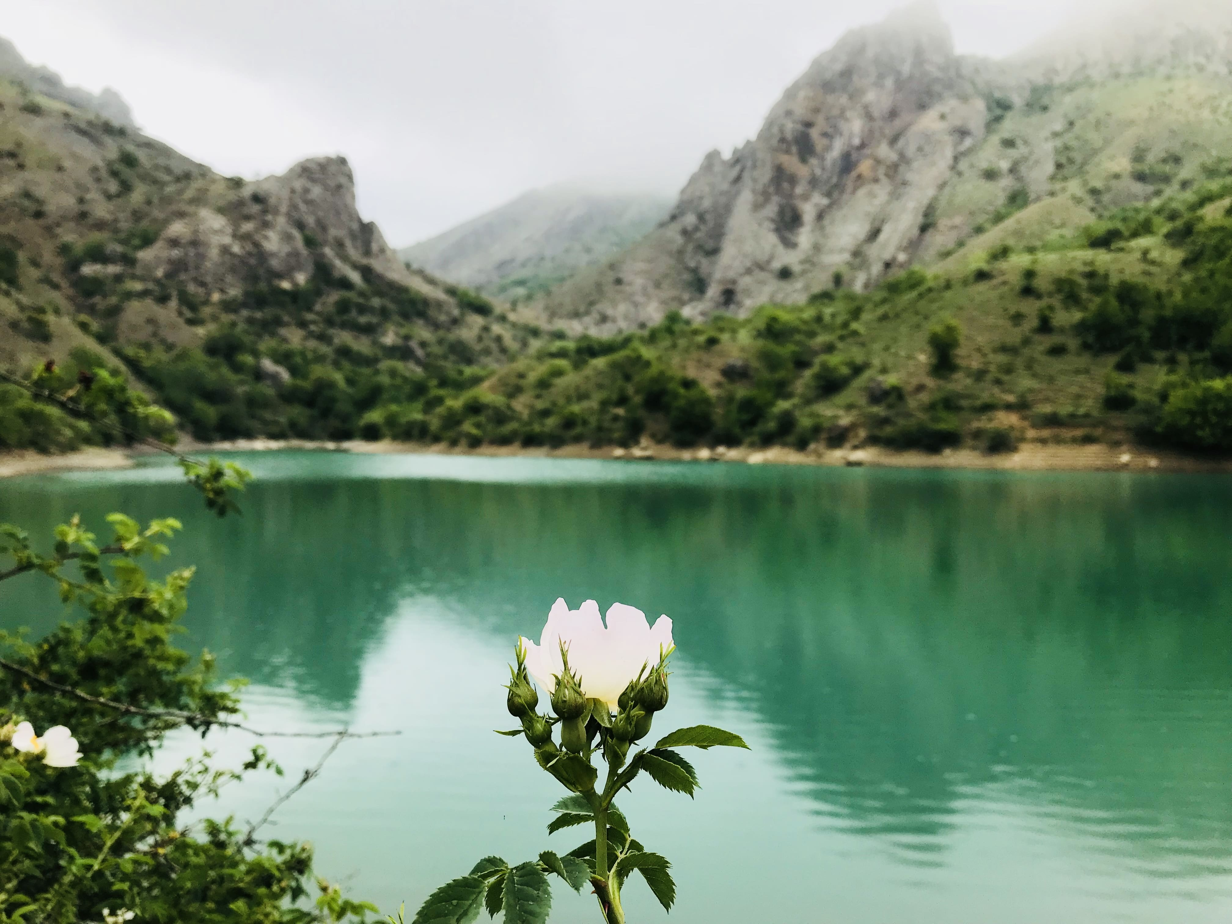 Фото озера Панагия в Зеленогорье, Крым. Весна.